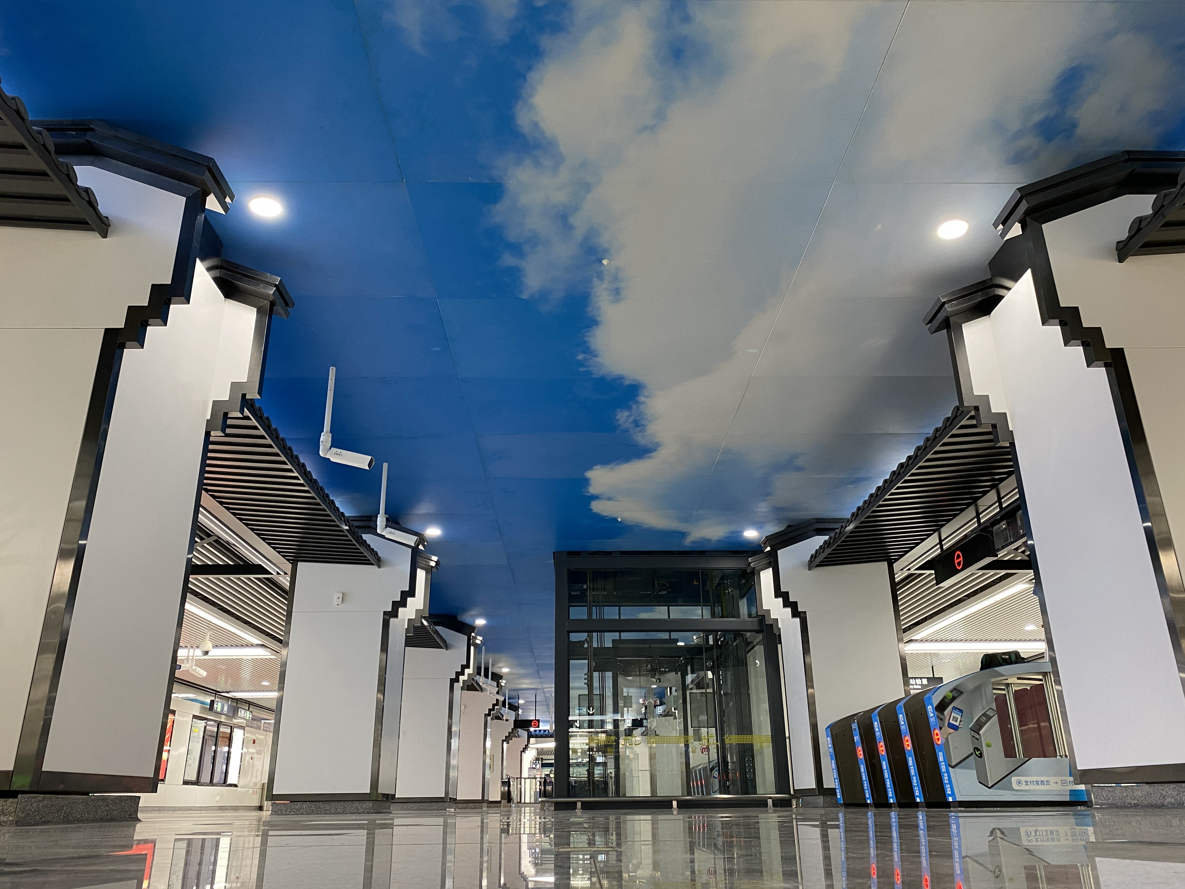 江城路站站厅